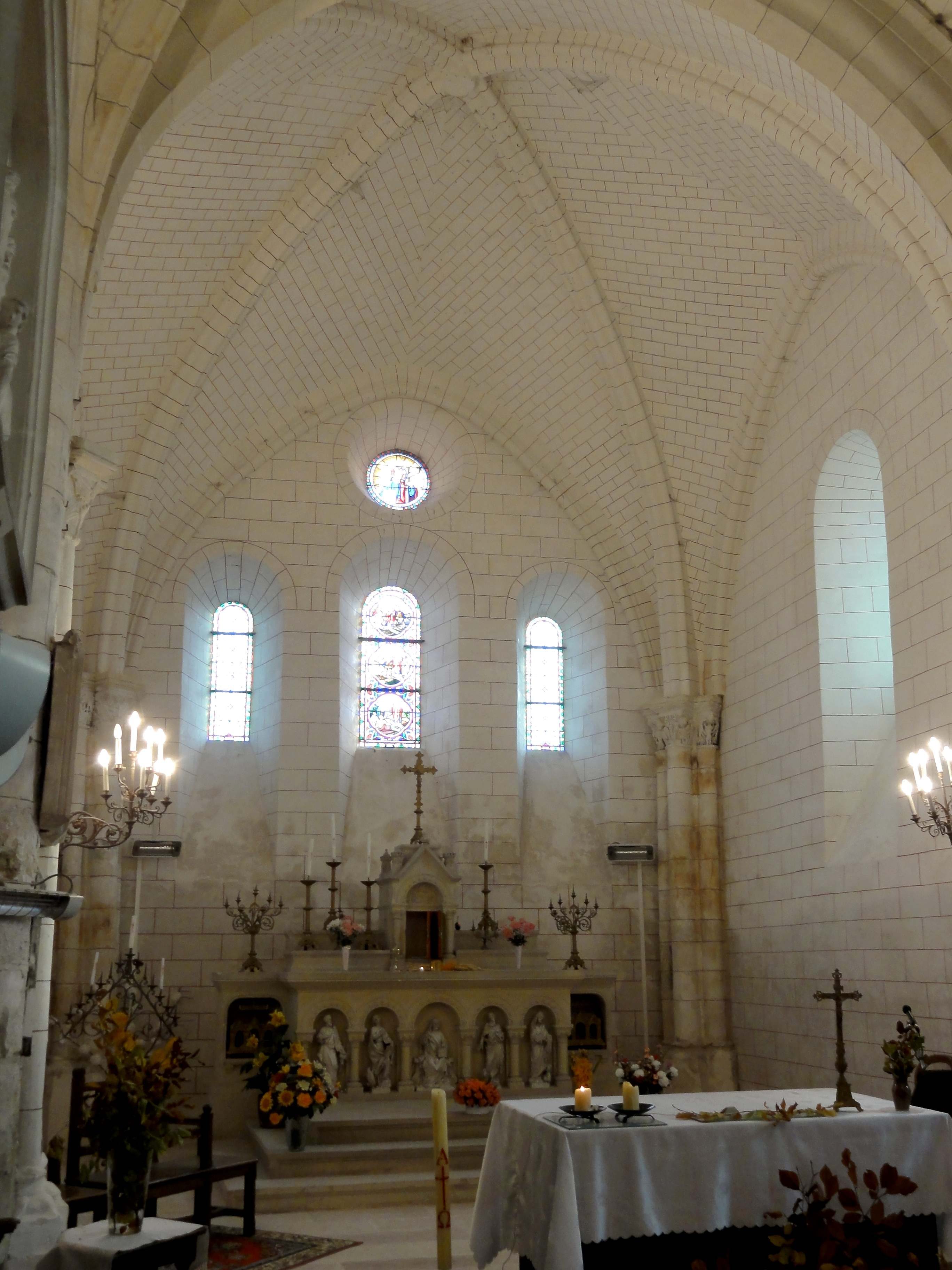 Abside.